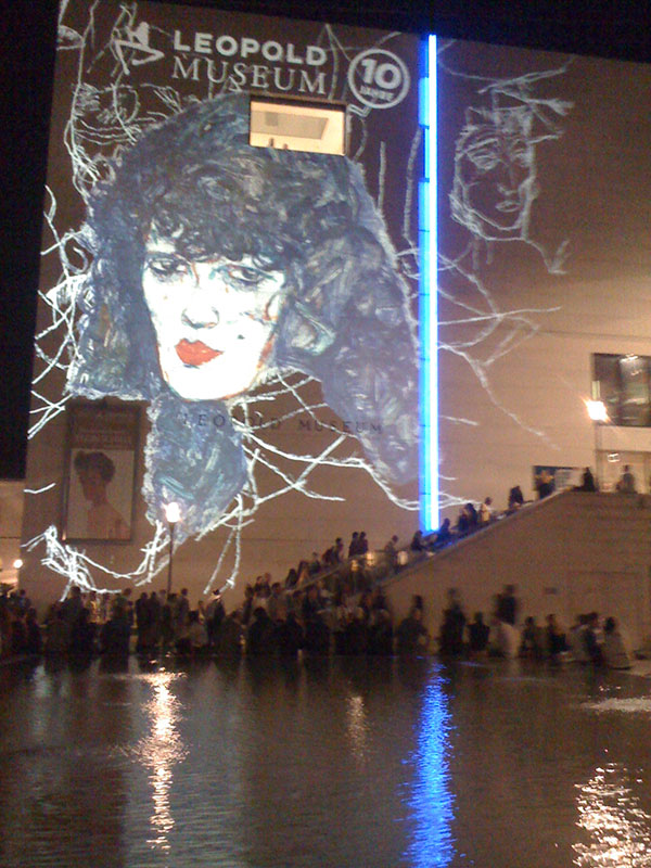 „Eclair Léopold“ am Leopold Museum Wien, eine computergesteuerte Lichtinstallation von Waltraut Cooper, beauftragt für das 10-jährige Jubiläum des Museums 2011. Foto: Cooper